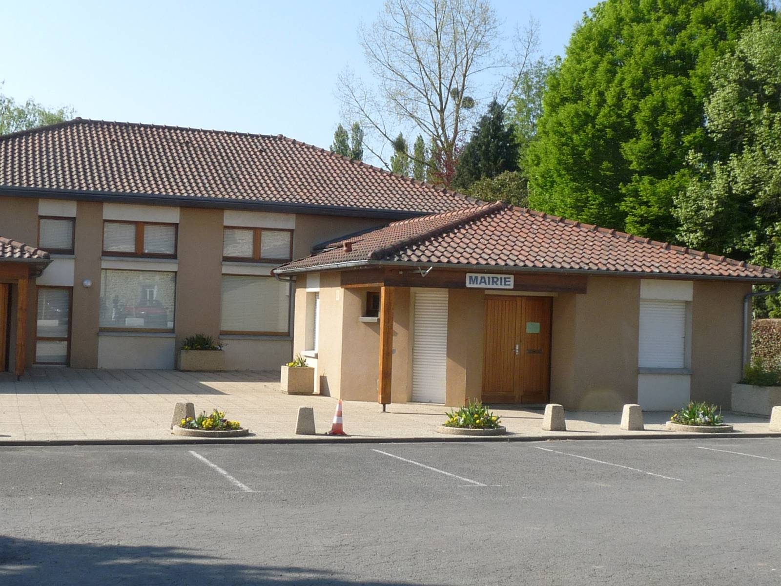 Mairie de Suris, Charente, France